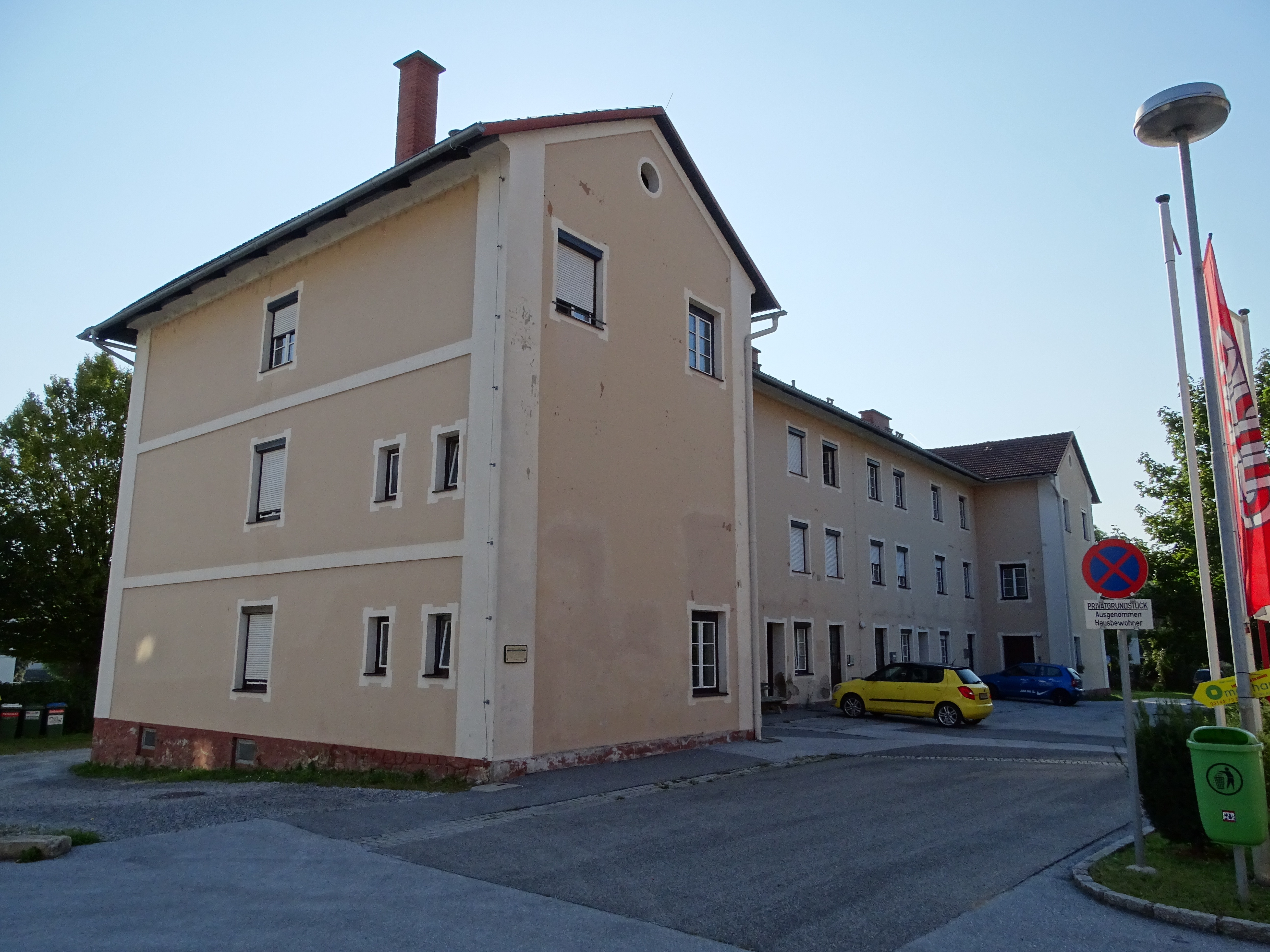 Die ehemalige Glasfabrik in der Hans-Blümel-Gasse in Voitsberg. Sie wurde 1859 von Karl Pollay gegründet, 1939 von der Familie Körbitz übernommen und schließlich am 23. Dezember 1983 geschlossen.